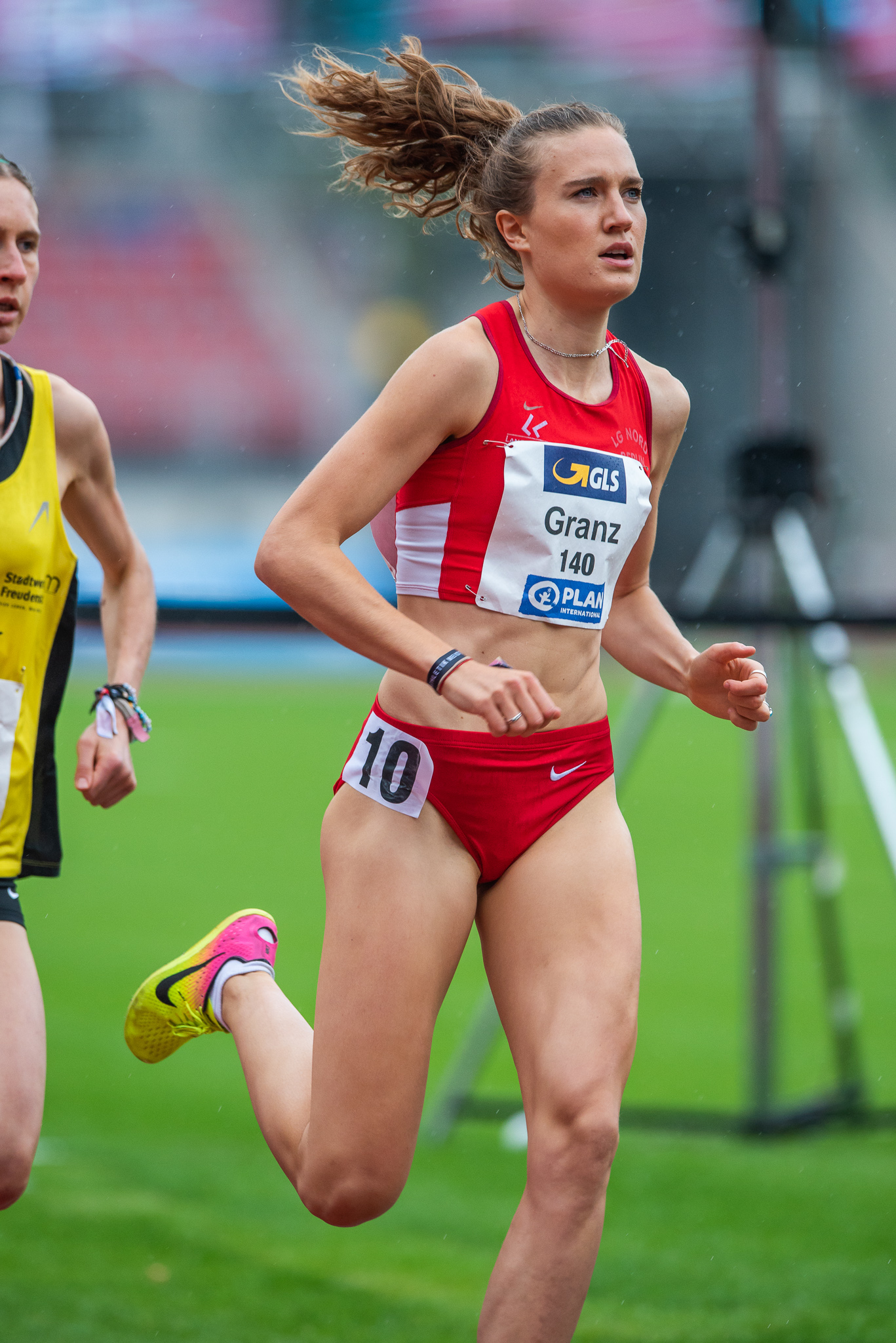 1500-Meter-Lauf,Caterina Granz,DLV,Deutsche Leichtathletik Meisterschaften 2018,Deutscher Leichtathletik-Verband,LG Nord Berlin,Max-Morlock-Stadion